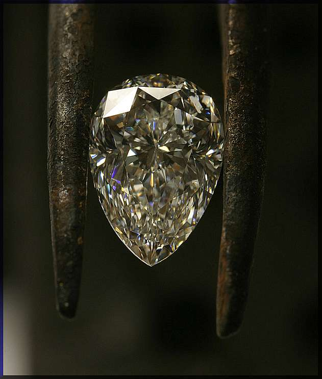 Natürlicher Diamant im Tropfenschliff (0,99 ct, feines Weiß + (F), vvsi)